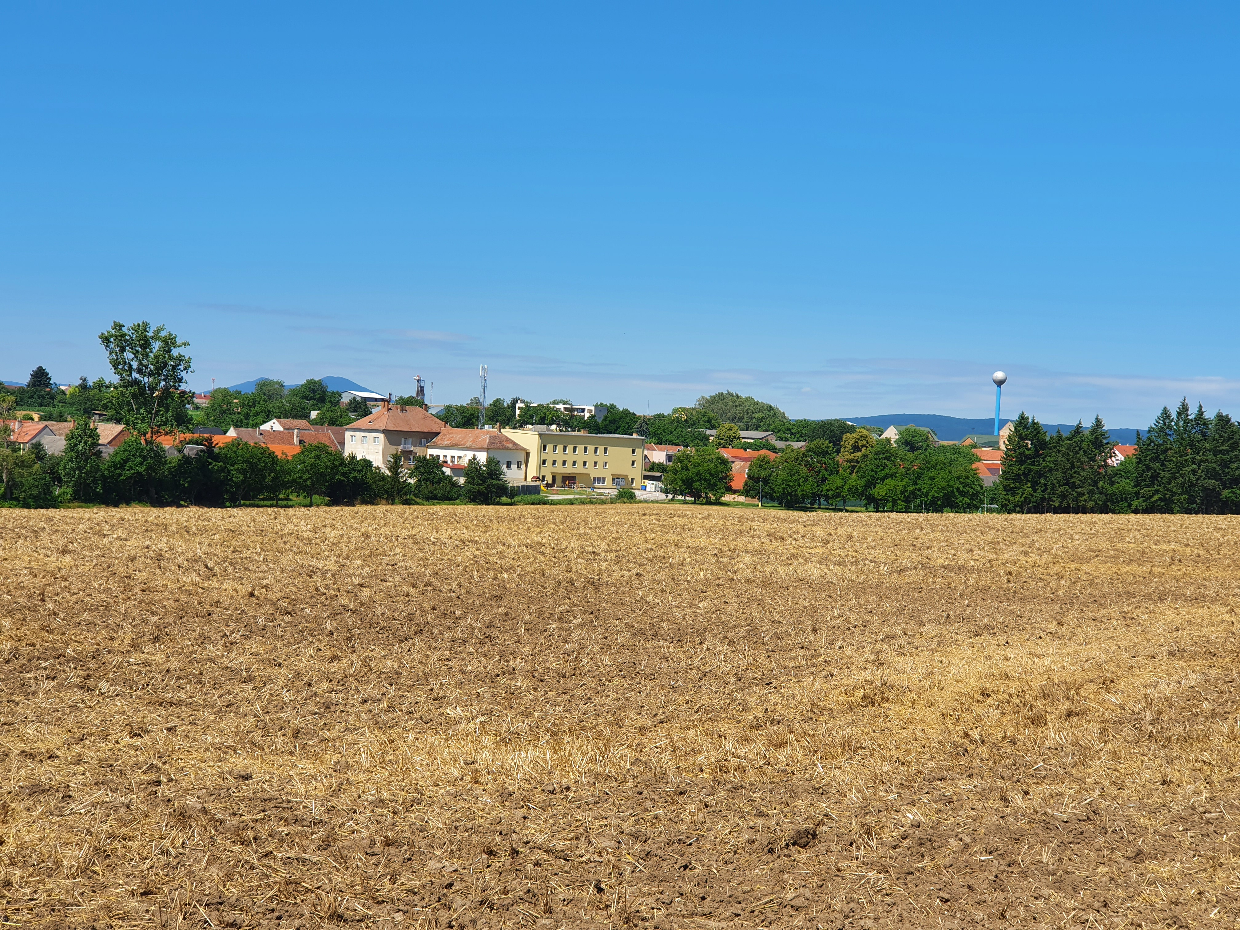 Obec Nižná